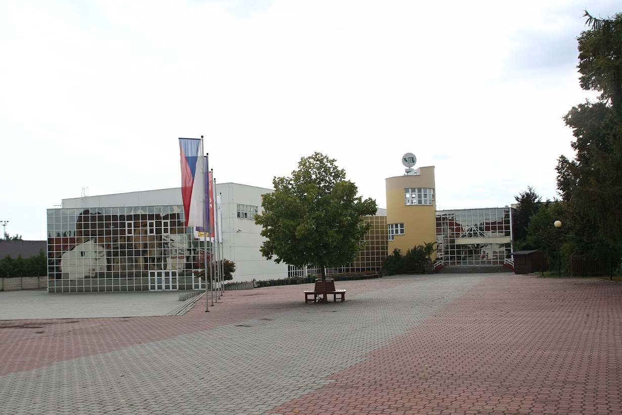 Pohled od vstupu z Masarykovi ulice.